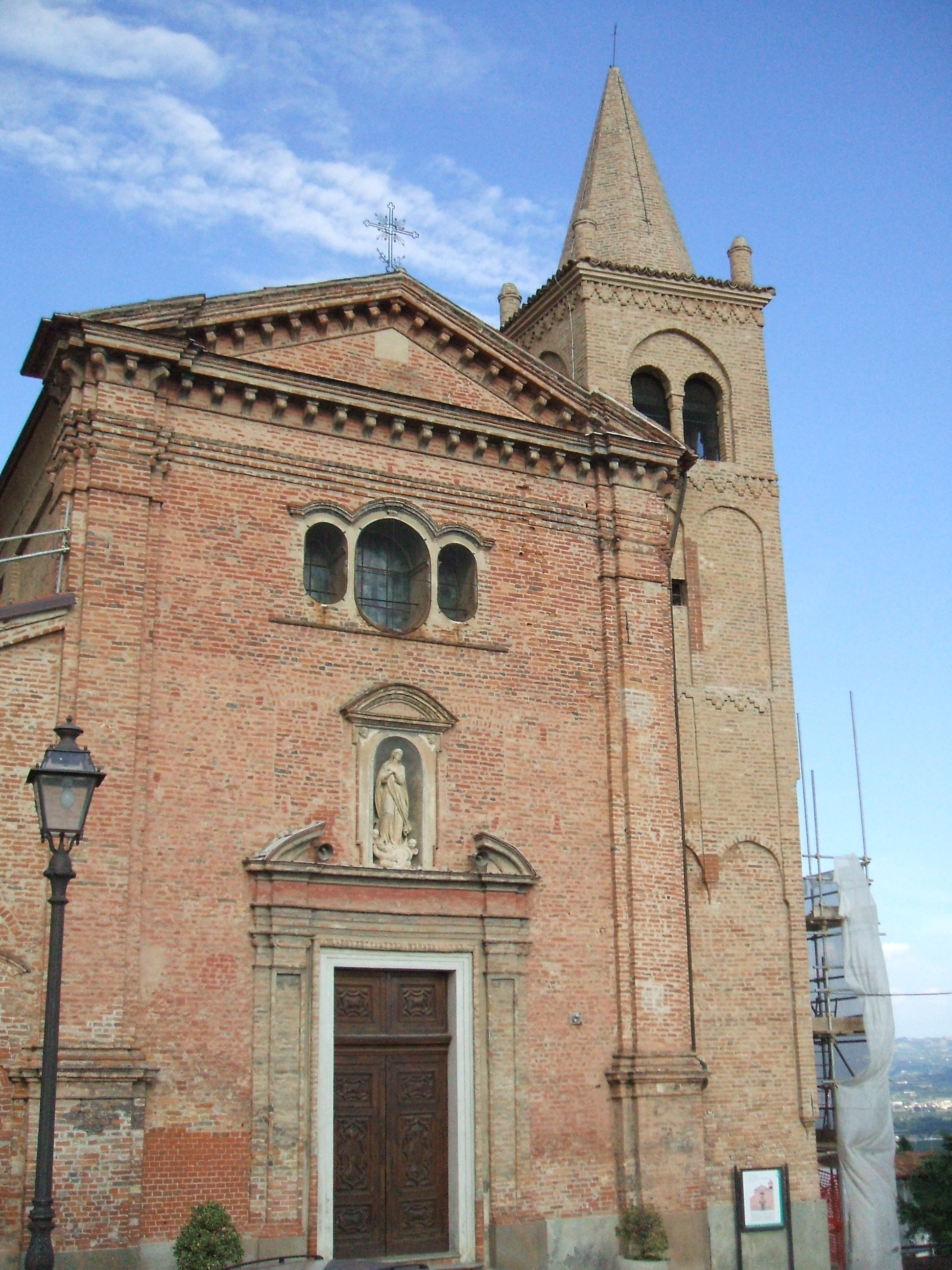 Chiesa di San Ponzio Martire a Monticello (piemonte)